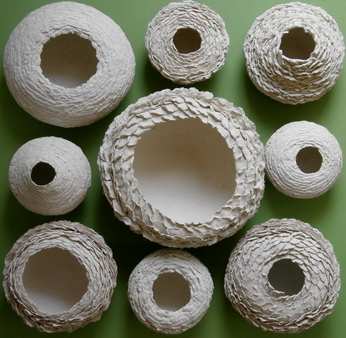 Lidia Boševski: "Ritam prirode - Paeonia lactiflora", keramika, 2010.